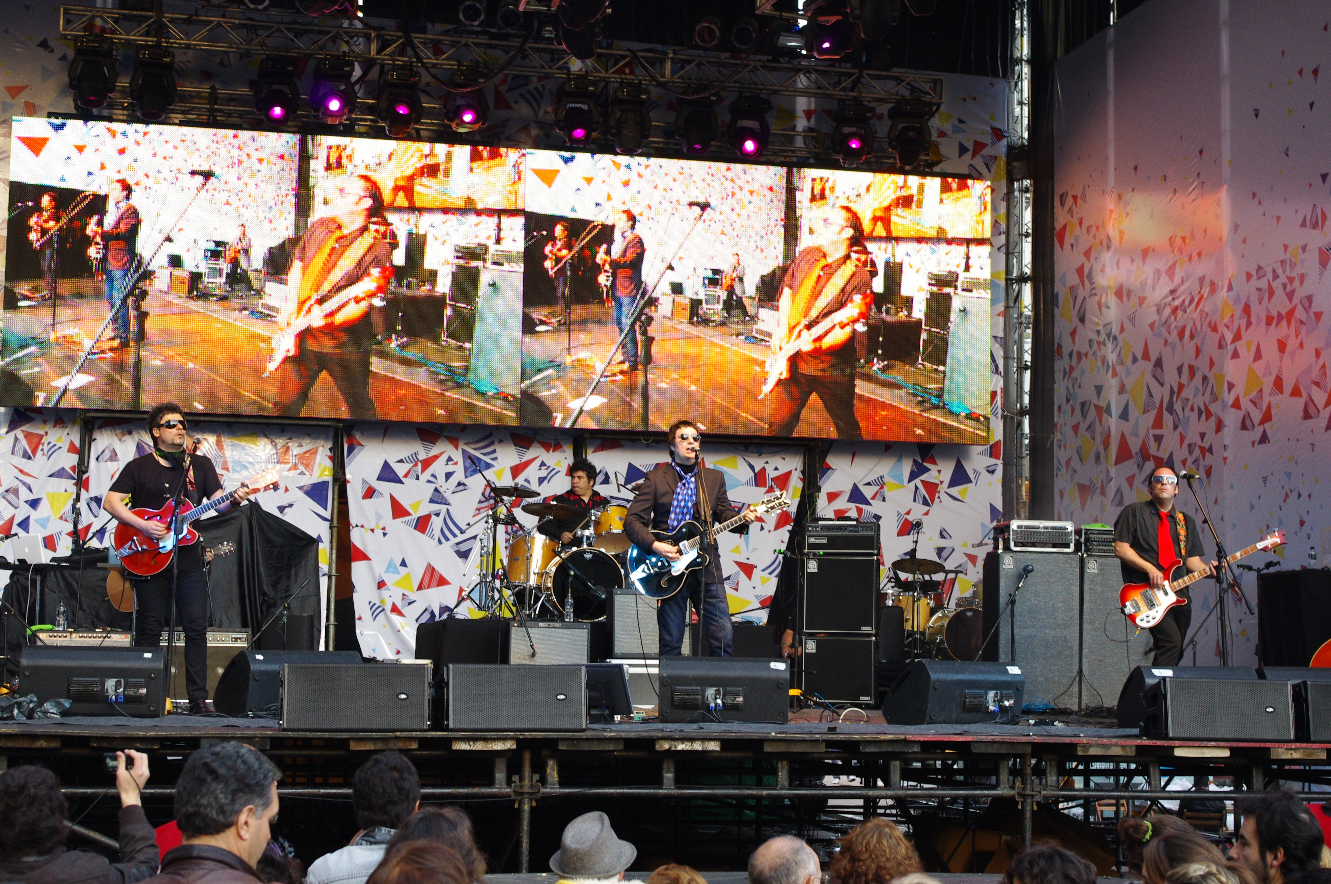 El grupo de rock chileno "Los Tres", brindando un concierto en el escenario del gaucho (intersección de las Calles 18 de Julio y Constituyente, Montevideo), en el marco de los festejos en Bicentenario en Uruguay.